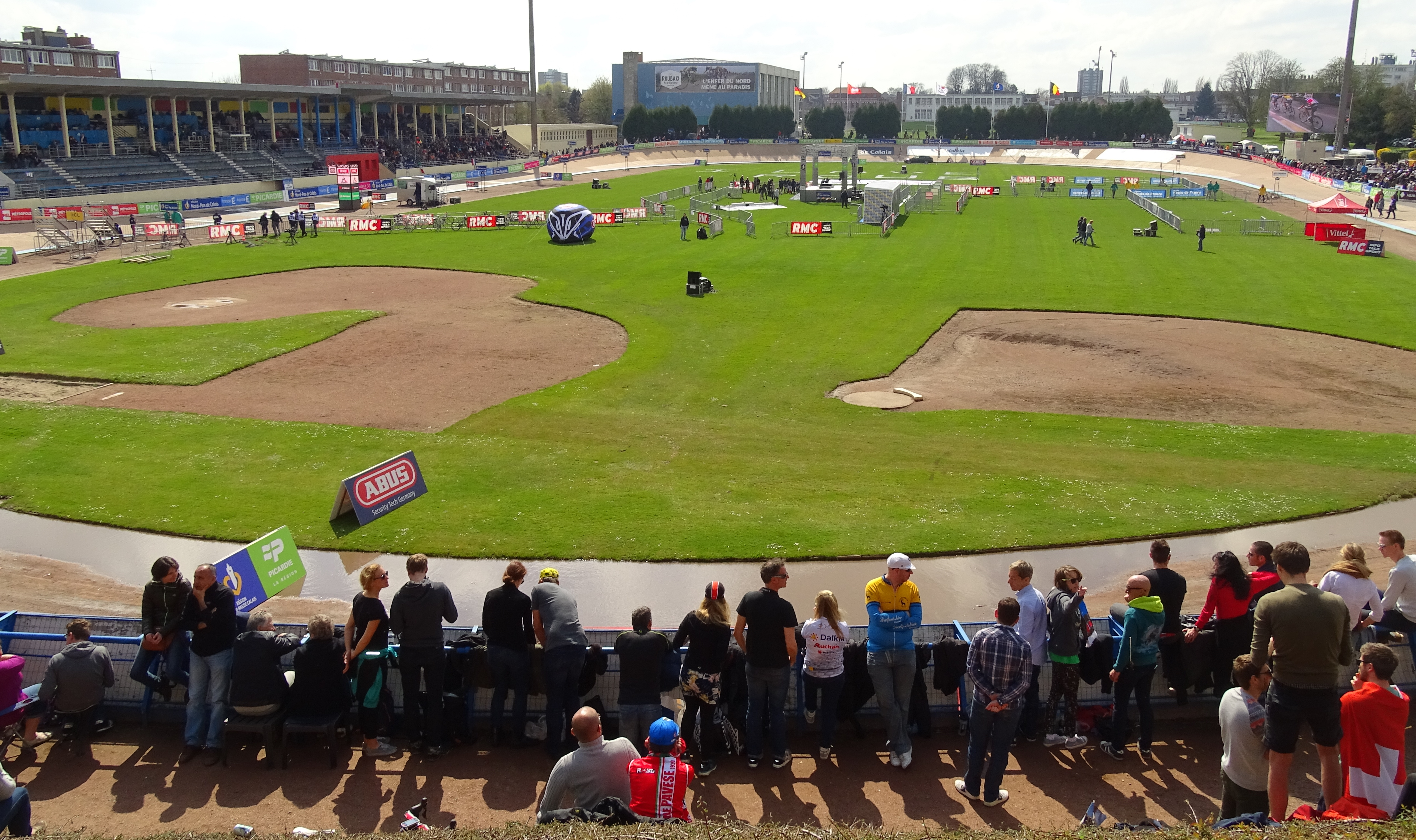 Reportage réalisé le dimanche 10 avril à l'occasion de l'arrivée du Paris-Roubaix juniors et du Paris-Roubaix 2016 à Roubaix, France.